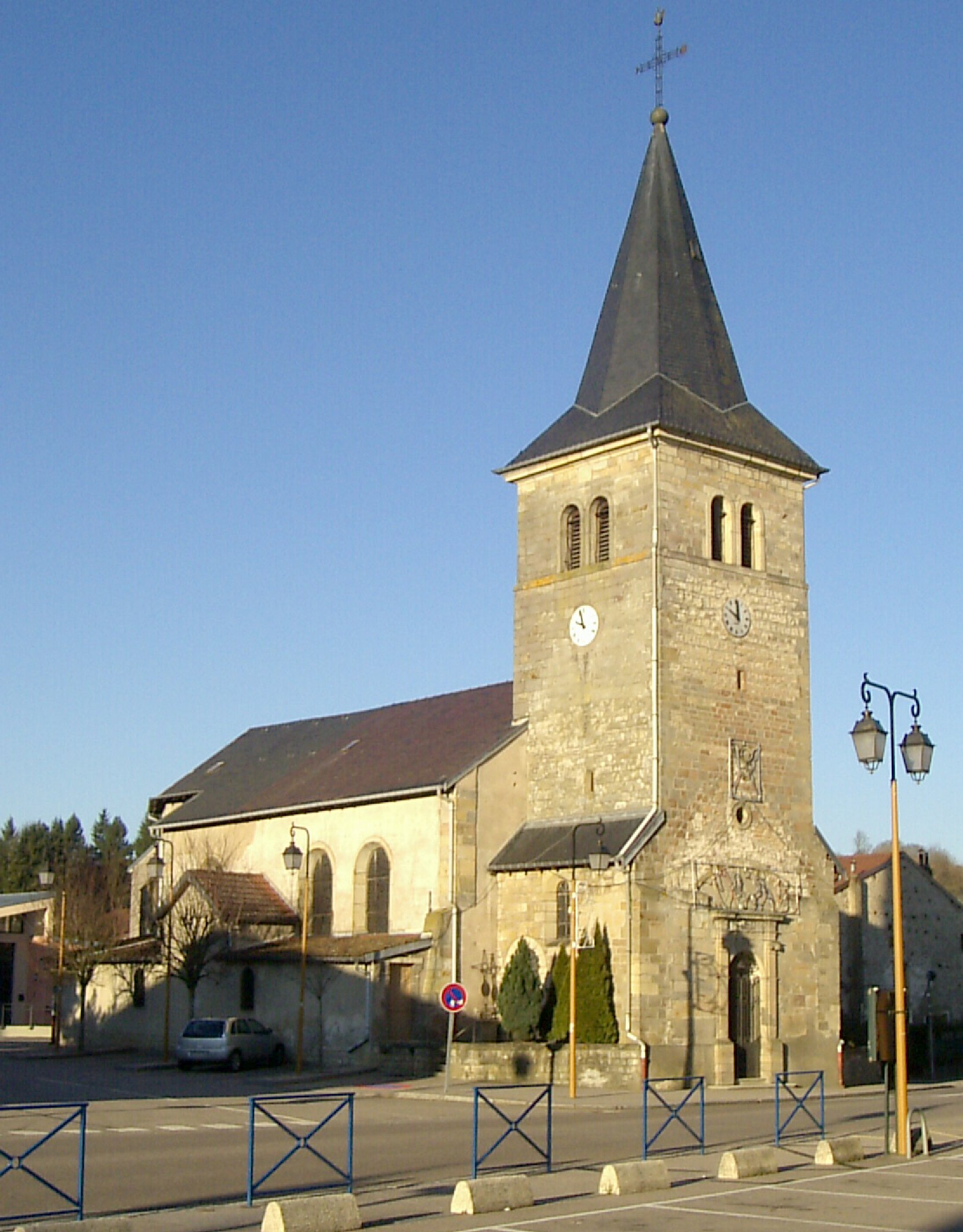 L'église Saint-Nicolas d'Igney